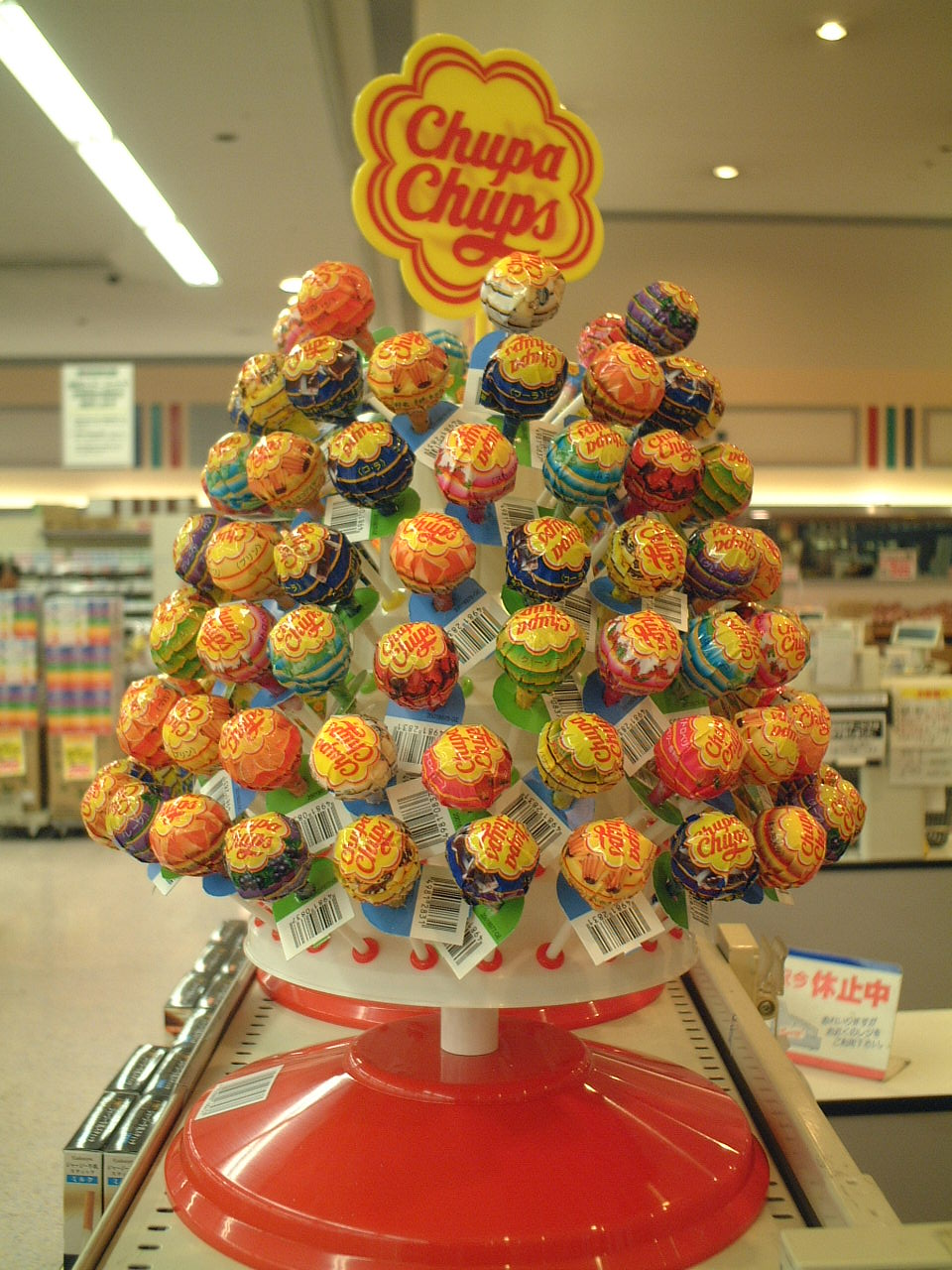 ChupaChups